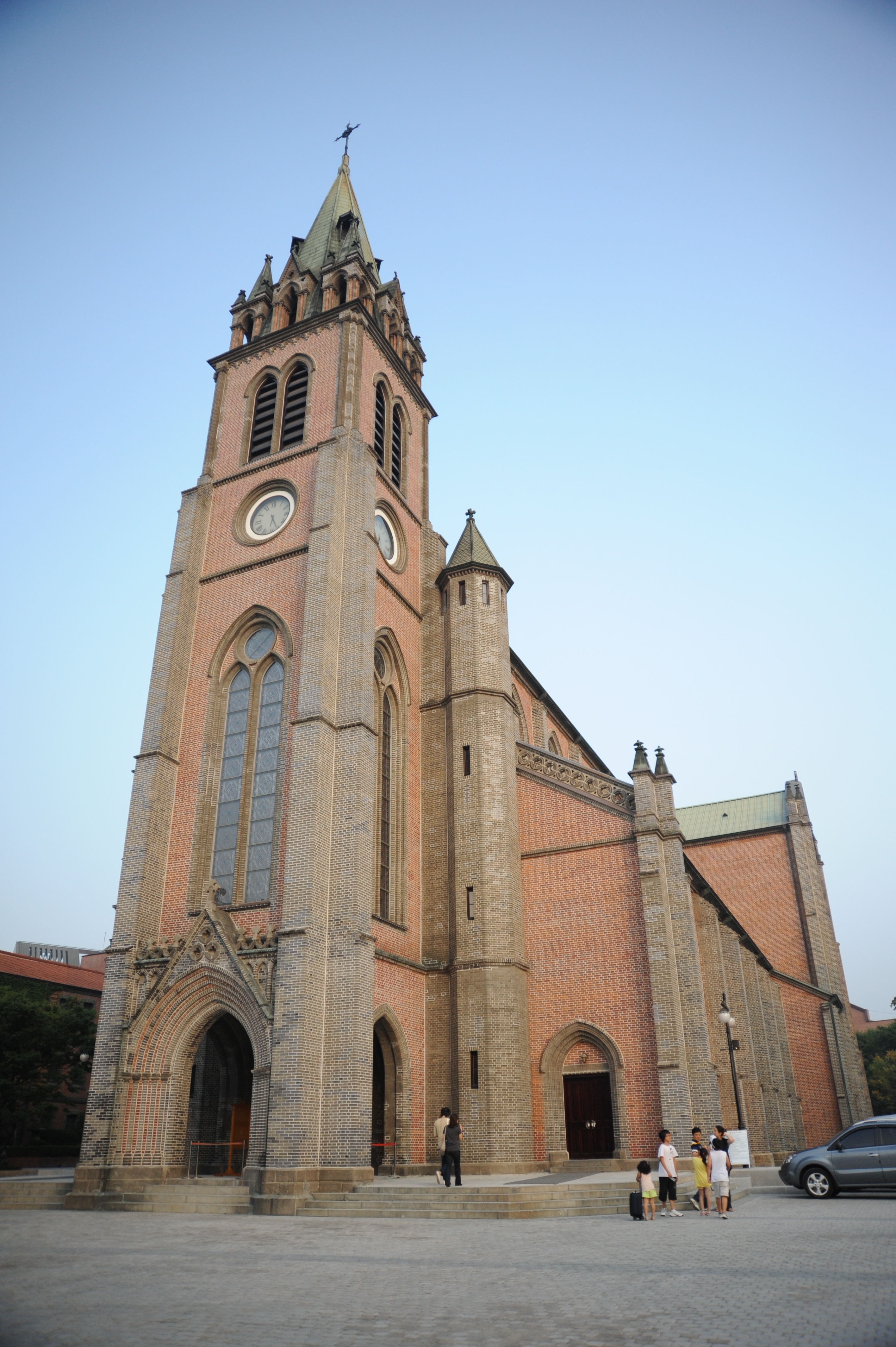 명동성당의 전경